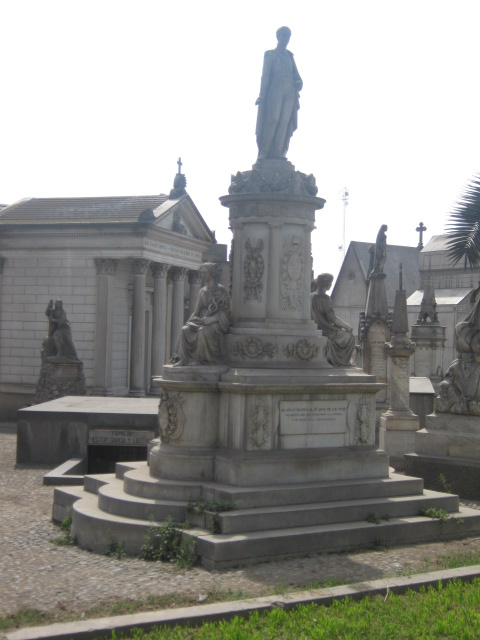 Jose de la mar (Tumba)